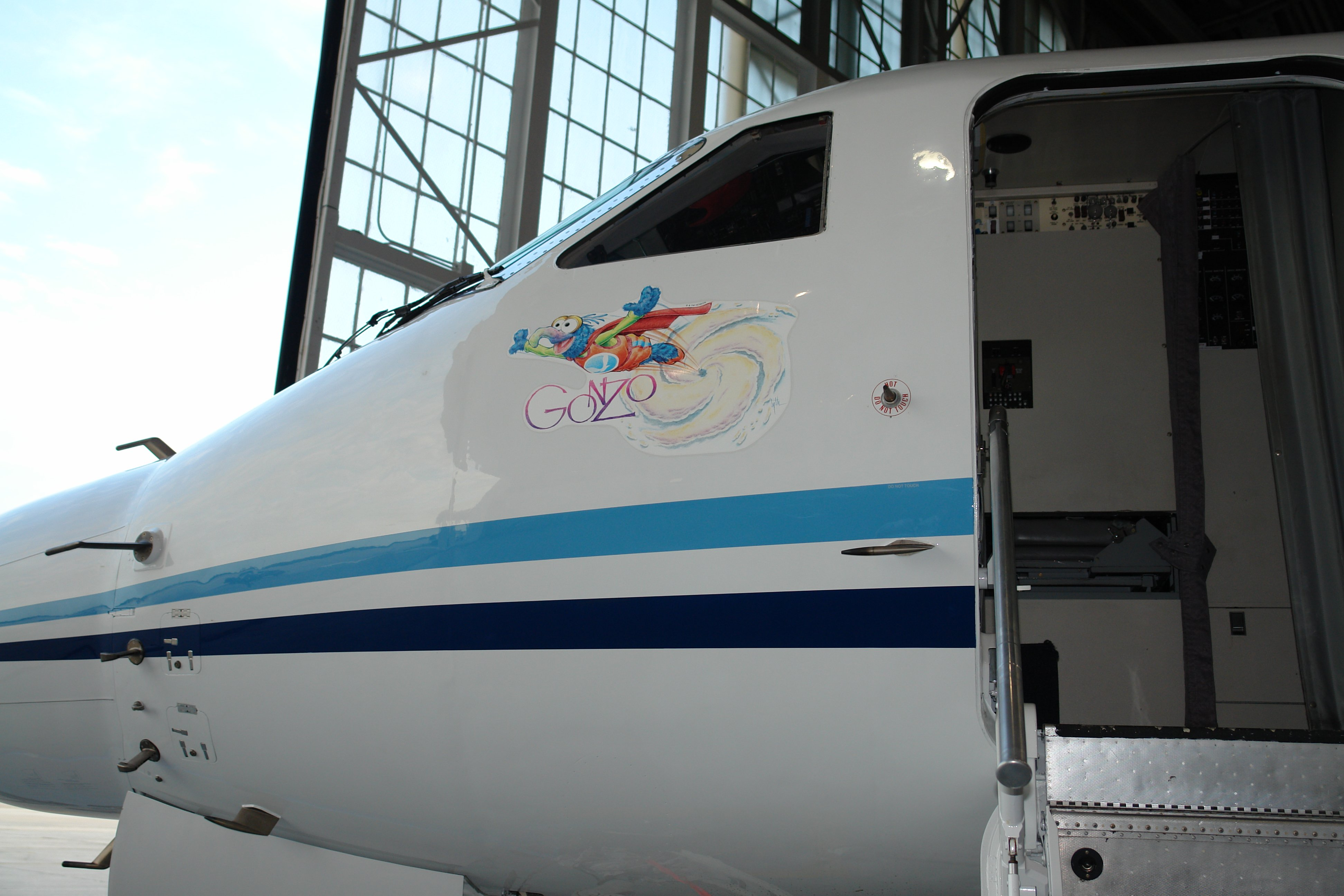 fly00496